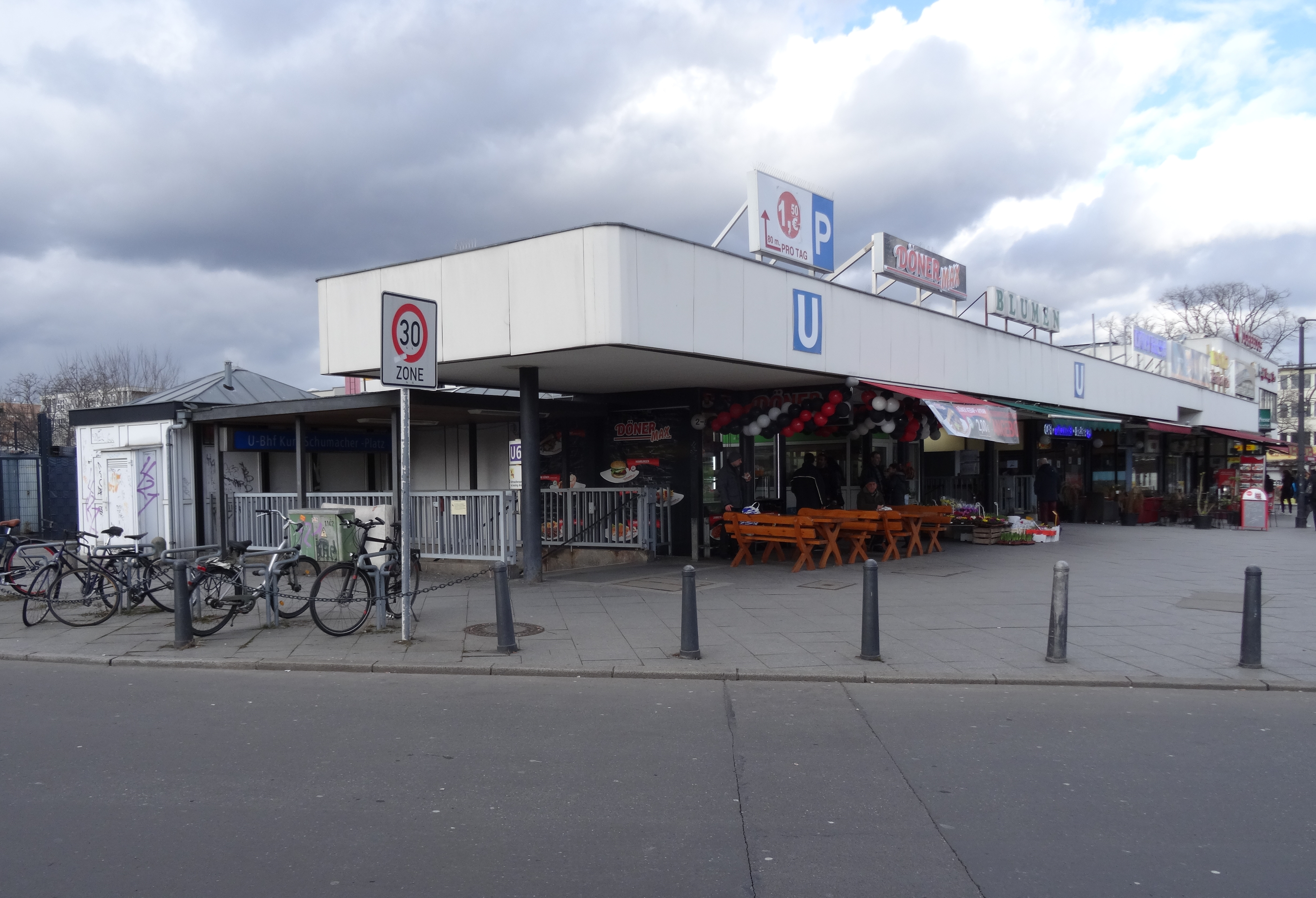 Linie U7